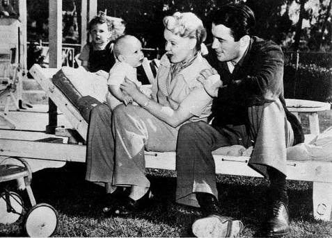 Gregory Peck with his wife Greta Kukkonen and two sons: Jonathan & Stephan, 1947.